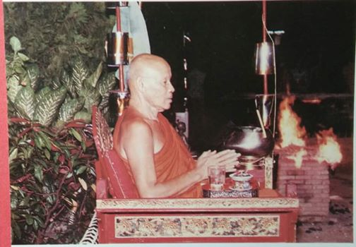 พระวิมลธรรมภาณ